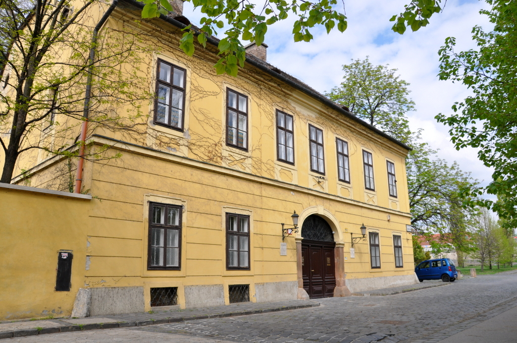 Szent Péter és Pál római katolikus plébánia This is a photo of a monument in Hungary, Identifier: 368